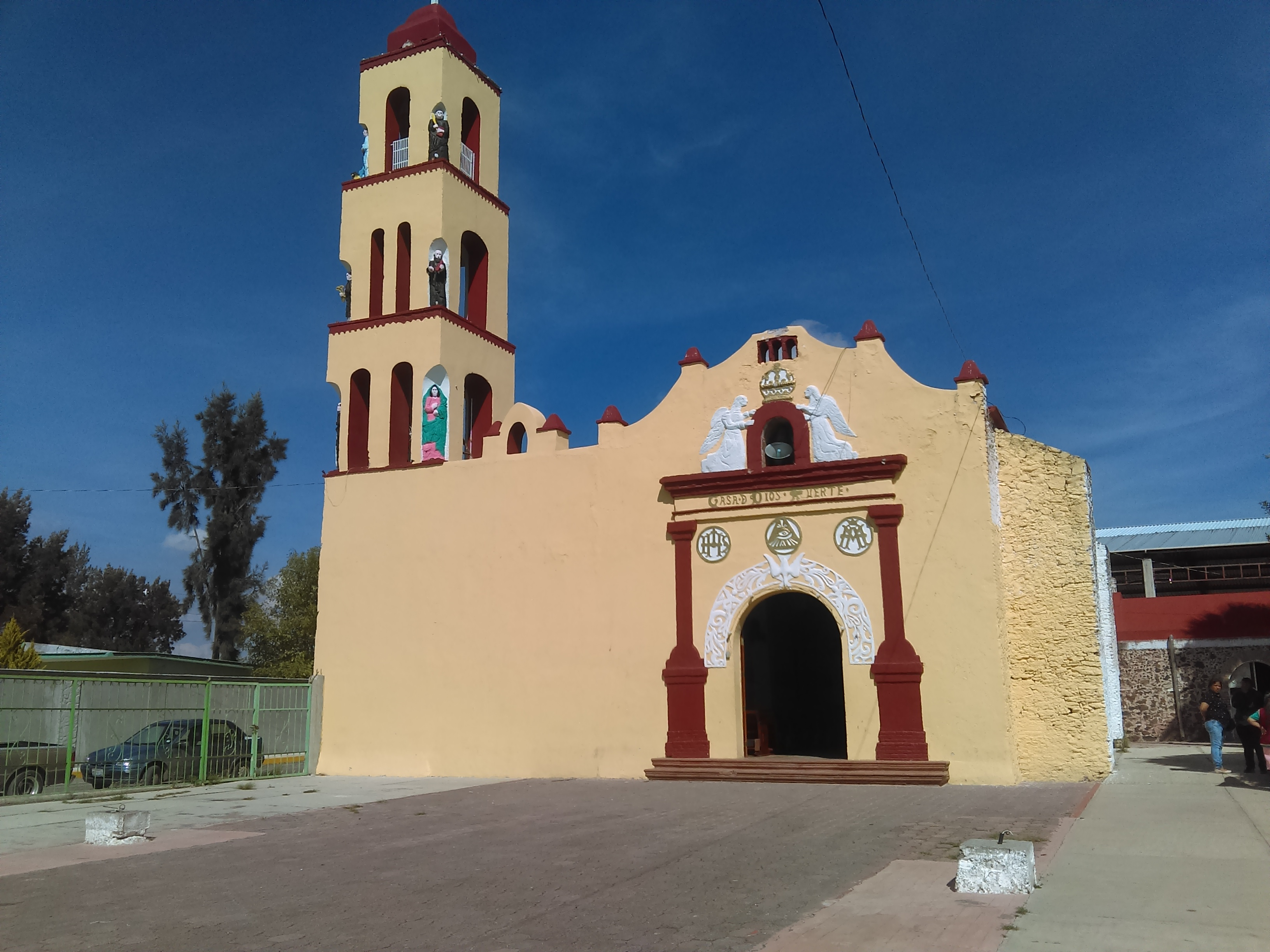 Parroquia de Dajiedhi en Actopan, Hidalgo, México.